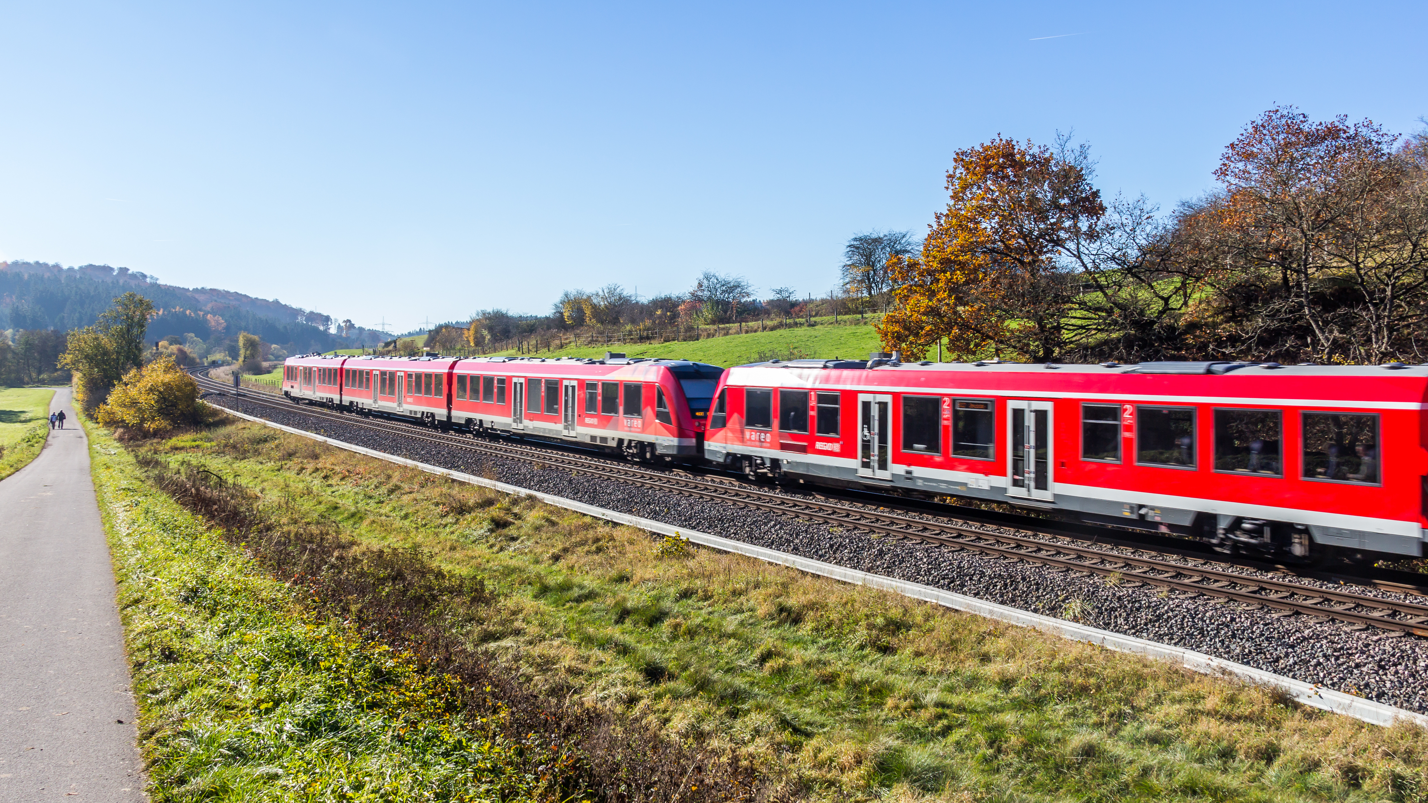 Dieseltriebwagen des Typs LINT 54 fährt als RE 22 im Urfttal südlich von Nettersheim durch die Eifel. Der Zug ist Teil des vareo-Netzes (Anfangsbuchstaben der Einzugsgebiete Voreifel, Ahrtal, Rhein, Eifel und Oberbergisches Land)